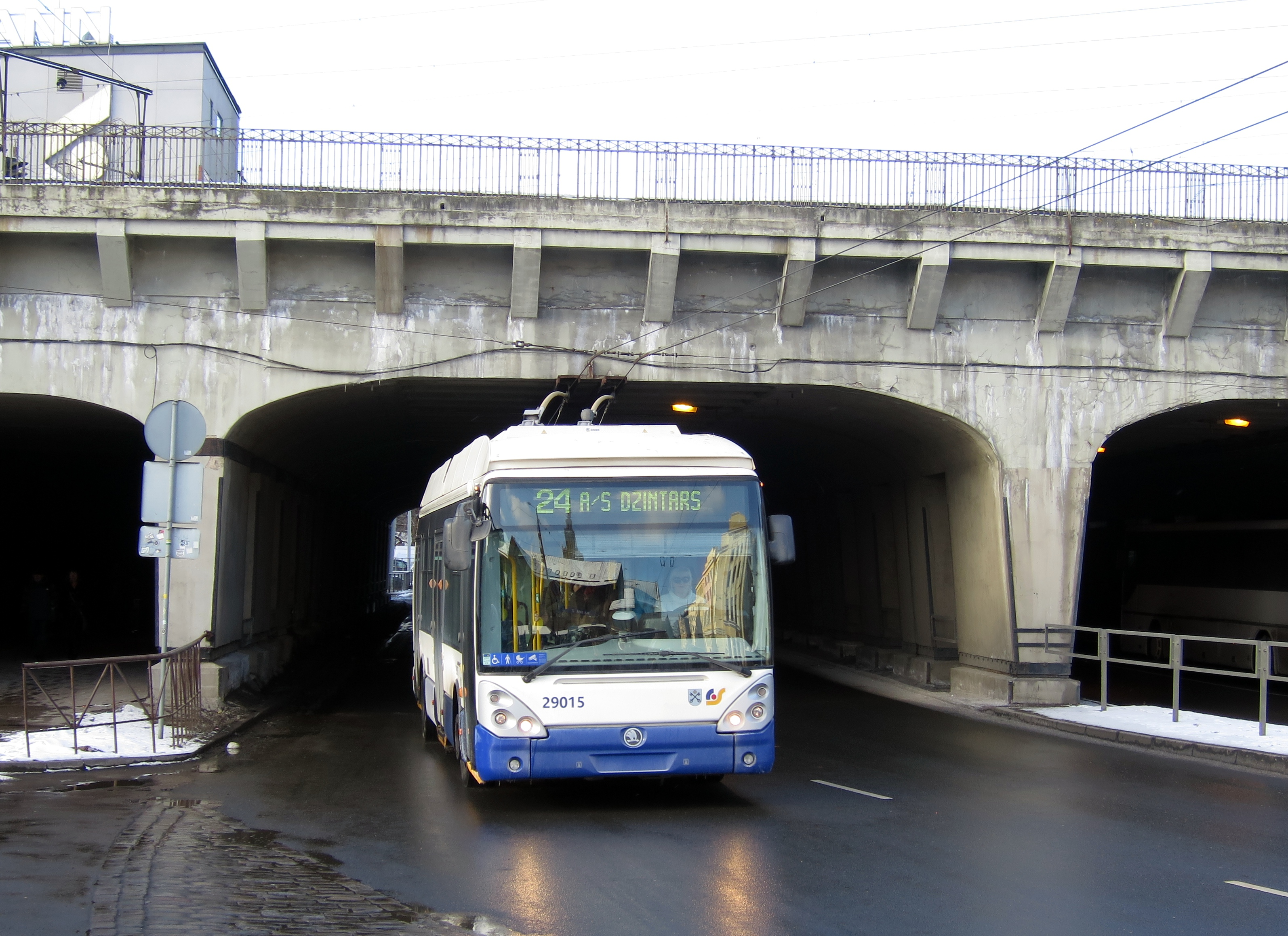 24. trolejbuss izbrauc no Gogoļa ielas tuneļa